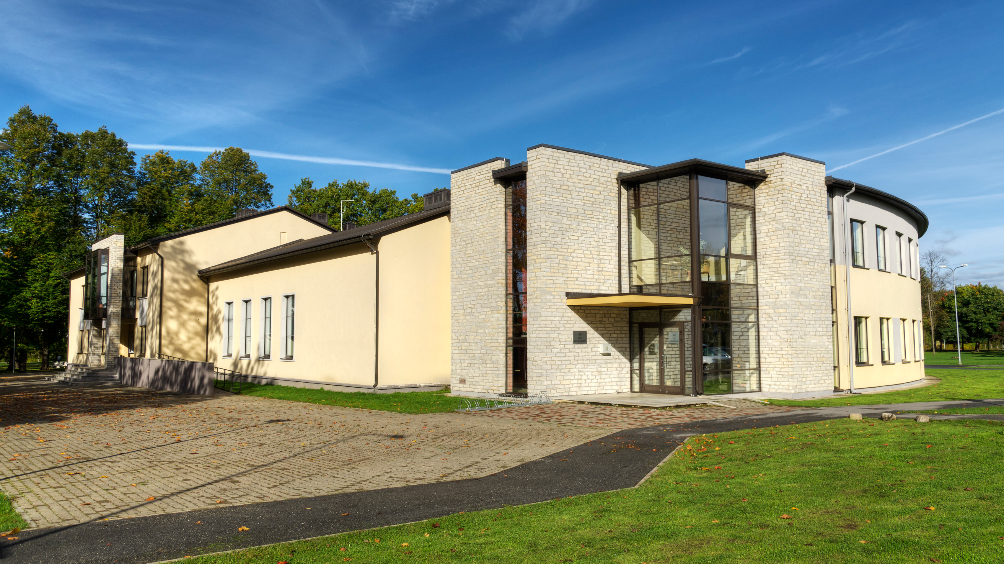 Türi kultuurimaja sügisel